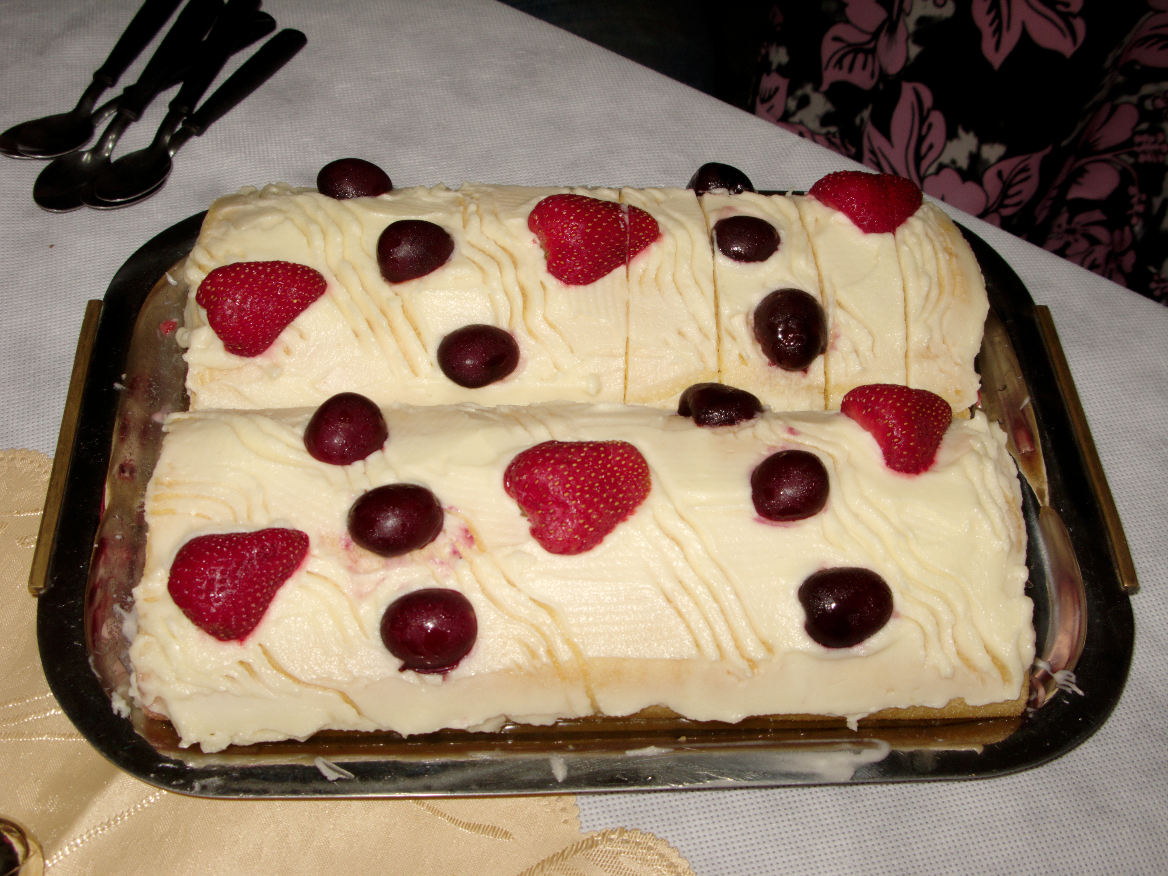 Piononos dulces argentinos caseros